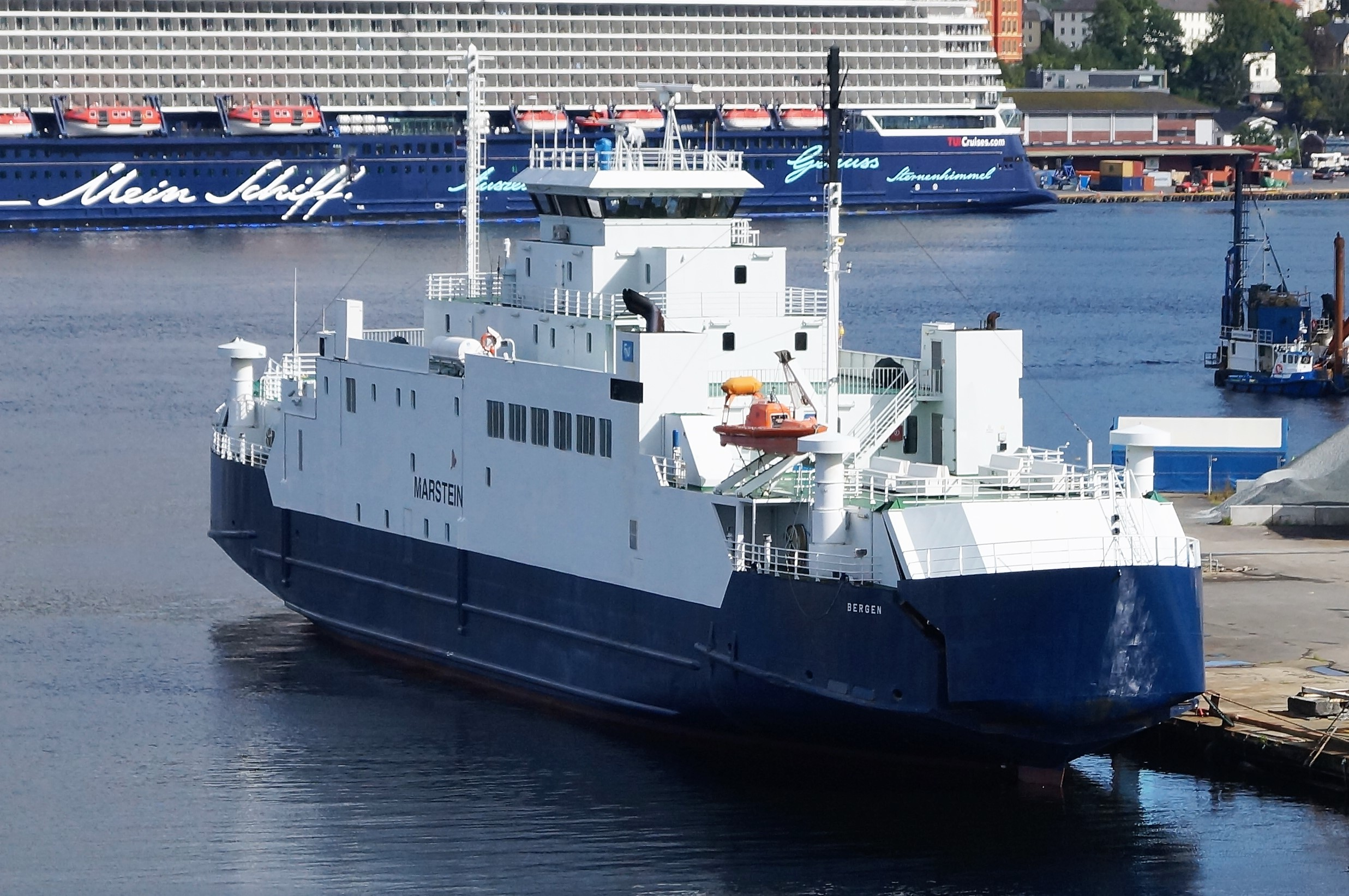 «Marstein» i Bergen